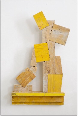 Seven of Nine, Star Trek, Vienna contemporary Kunst Messe